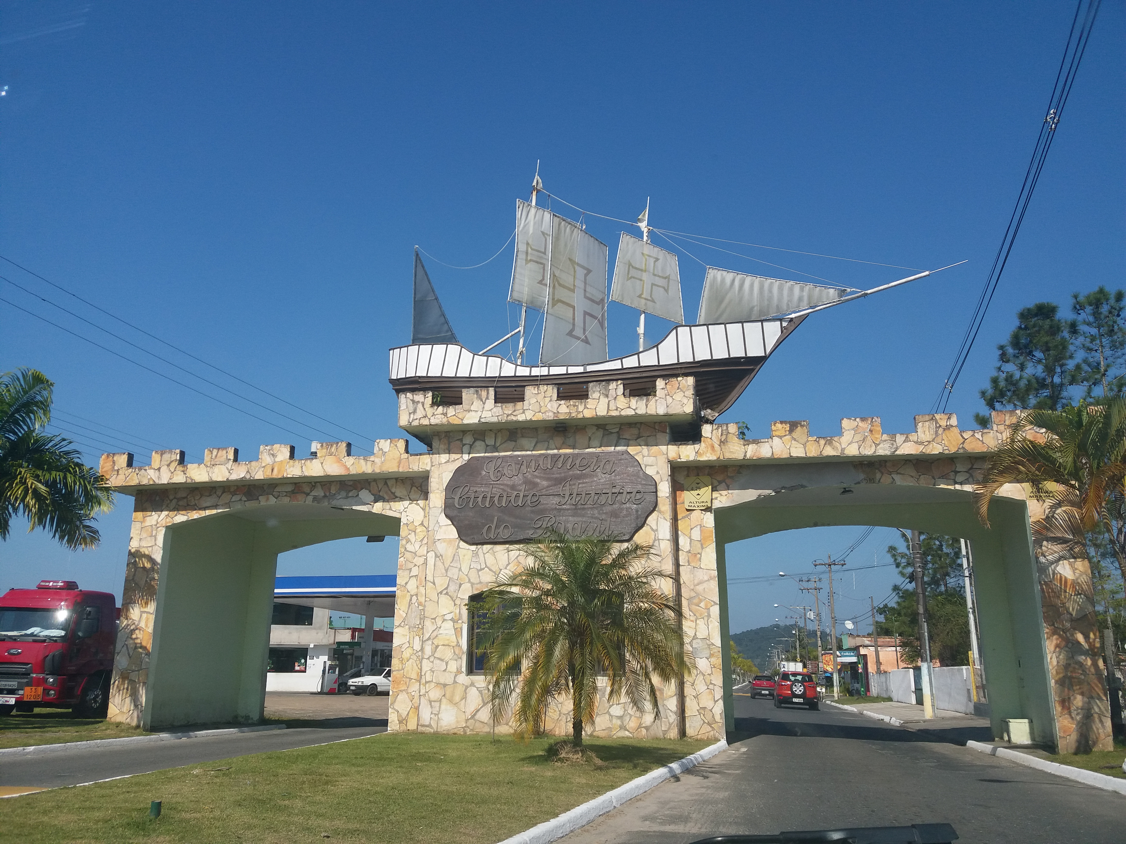 cananéia sao paulo brazil